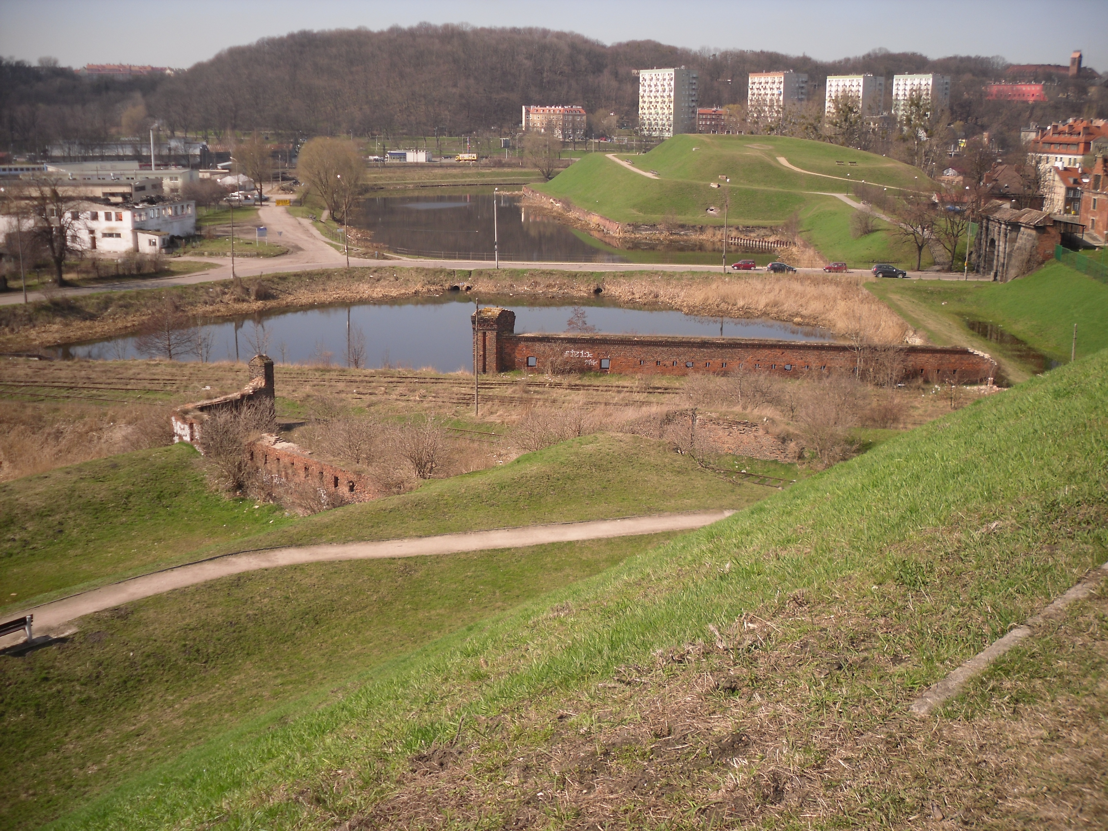 Stacja kolejowa Gdańsk Grobla i Bastion Żubr.